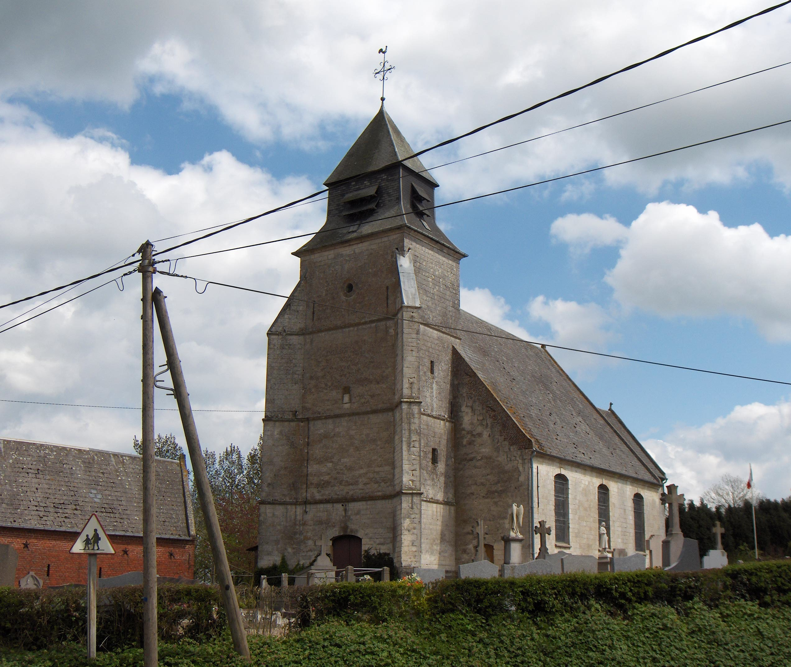 Henu, église Saint-Nicolas de 1774 (dépt. Pas-de-Calais, France)